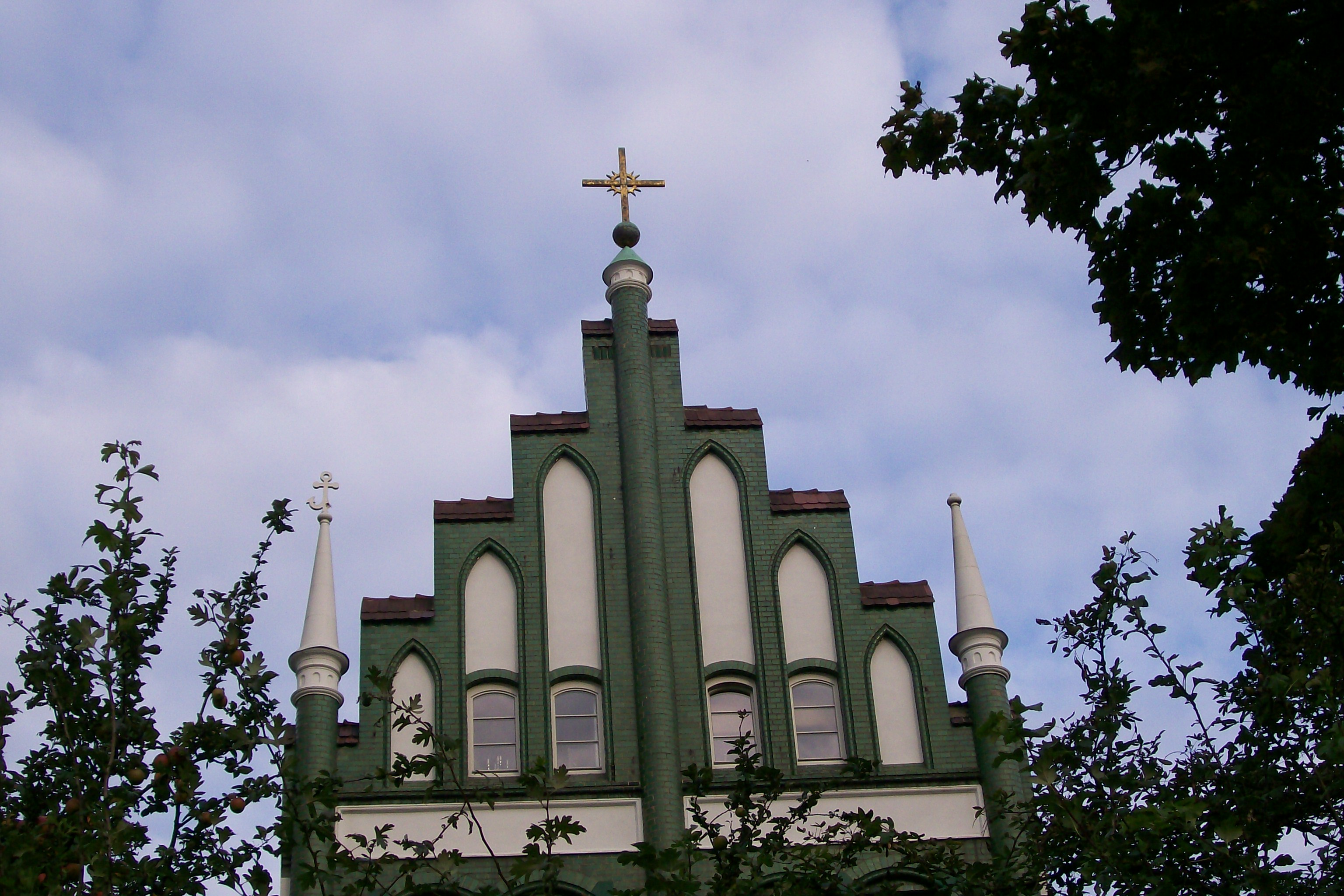 Giebel der Schwedischen Kirche in der Hafenstraße in Lübeck, eigentlich Svenska Kyrkan, gebaut 1904, bis 1968 als Kirche der Schwedischen Staatskirche genutzt, letzter Gottesdienst 1968, jetzt Wohnhaus